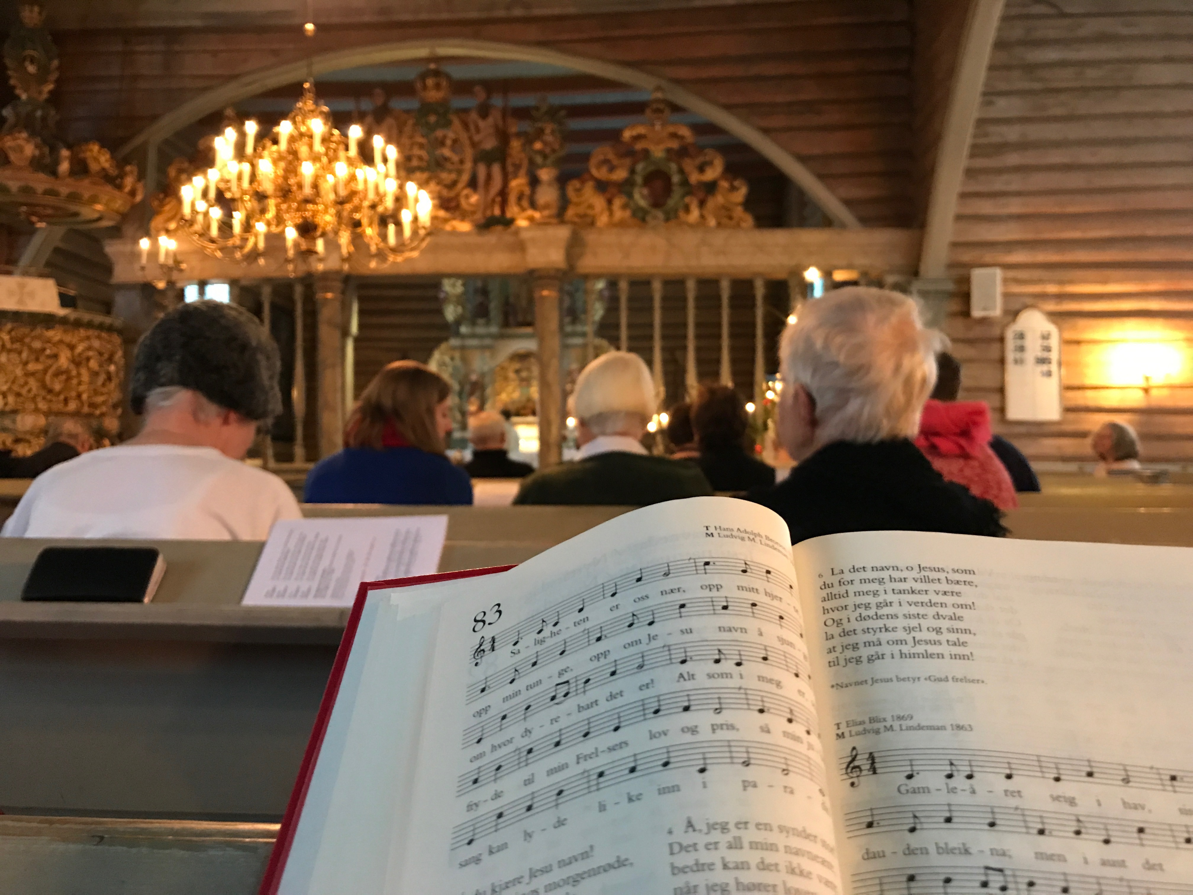 Gudstjeneste i Biri kirke.